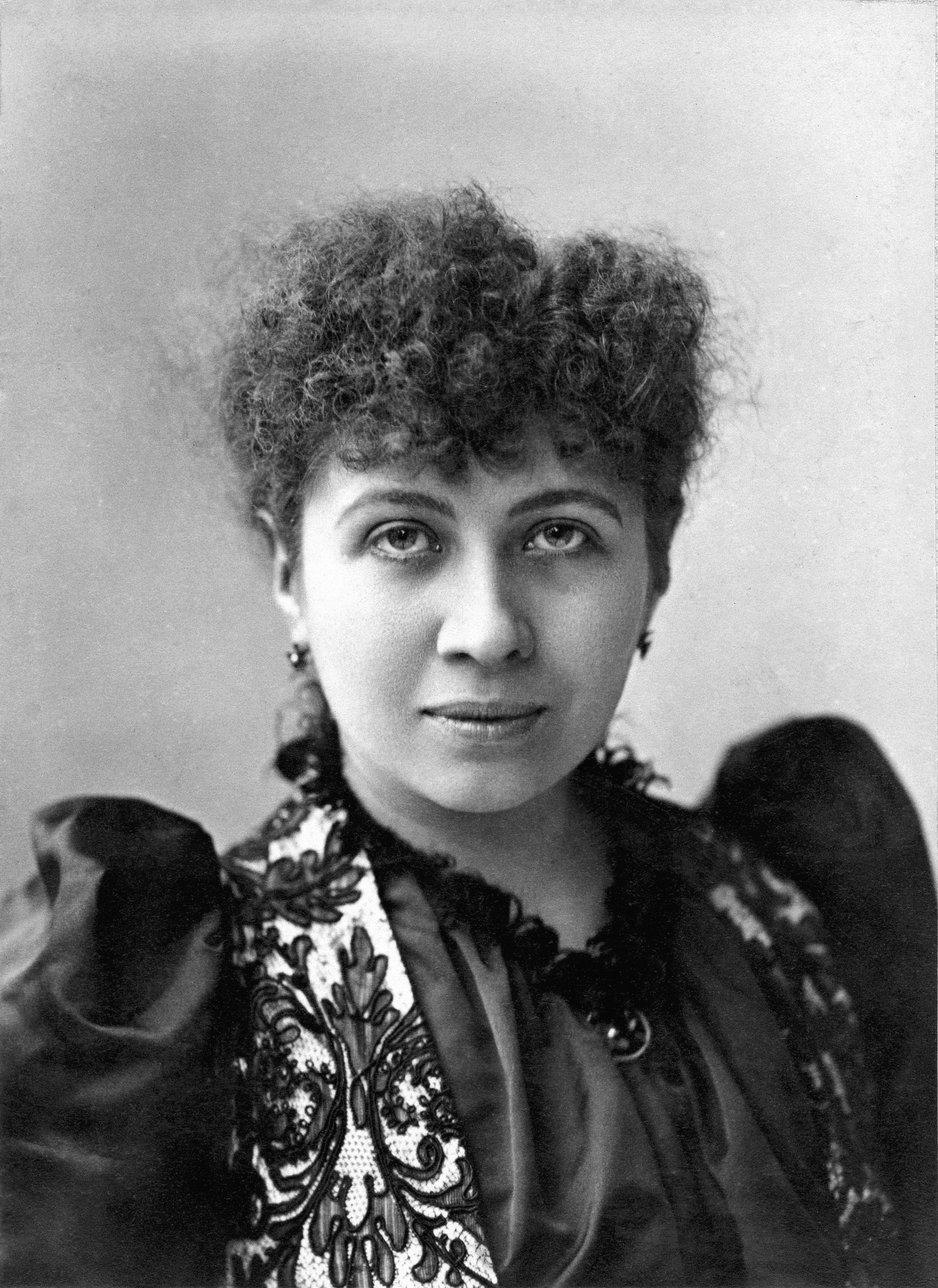 Séverine (1855–1929)), French anarchist, journalist, and feminist.